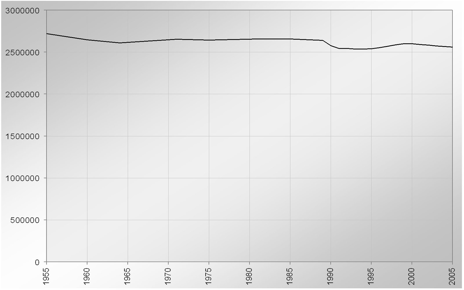 Einwohnerentwicklung des Bundeslandes Brandenburg von 1955 bis 2005. Daten aus Mit MS Excel erstellt. (en: Population of federal country of Brandenburg, Germany from 1955 to 2005)